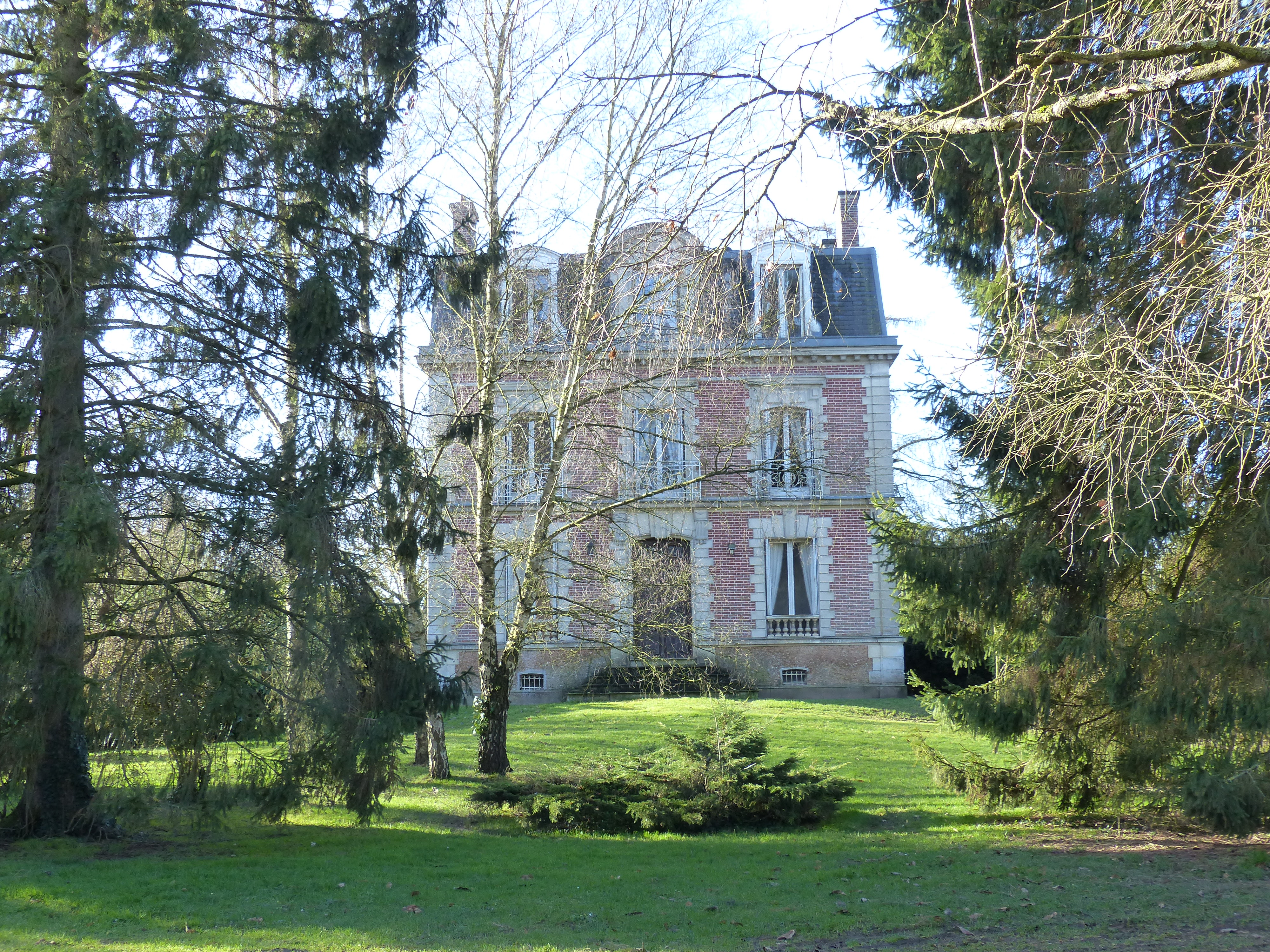 Maison noble, rue du Petit-Bout à Haute-Épine